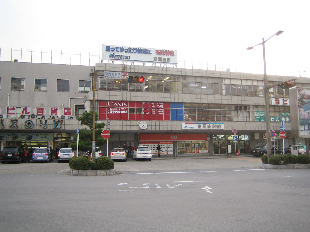 Higashi-Okazaki Station (東岡崎駅), in Okazaki, Aichi, Japan